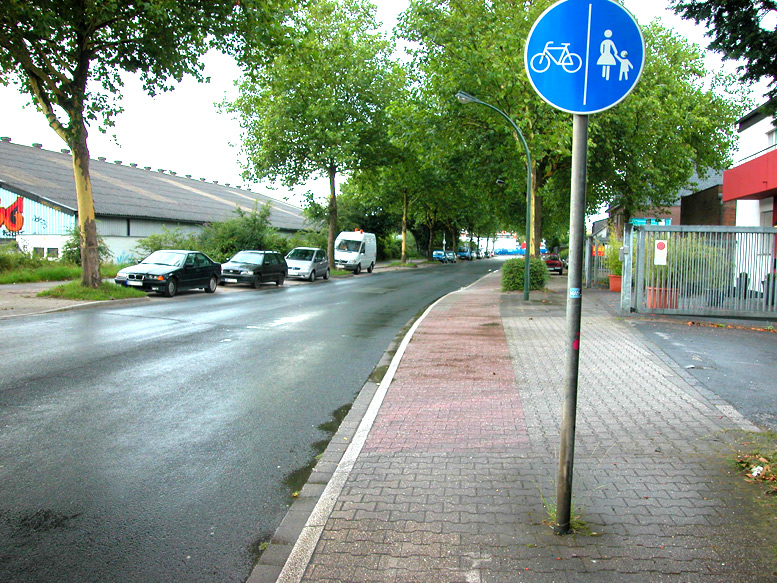 Die Straße «Bayreuther Straße» in Benrath, Düsseldorf